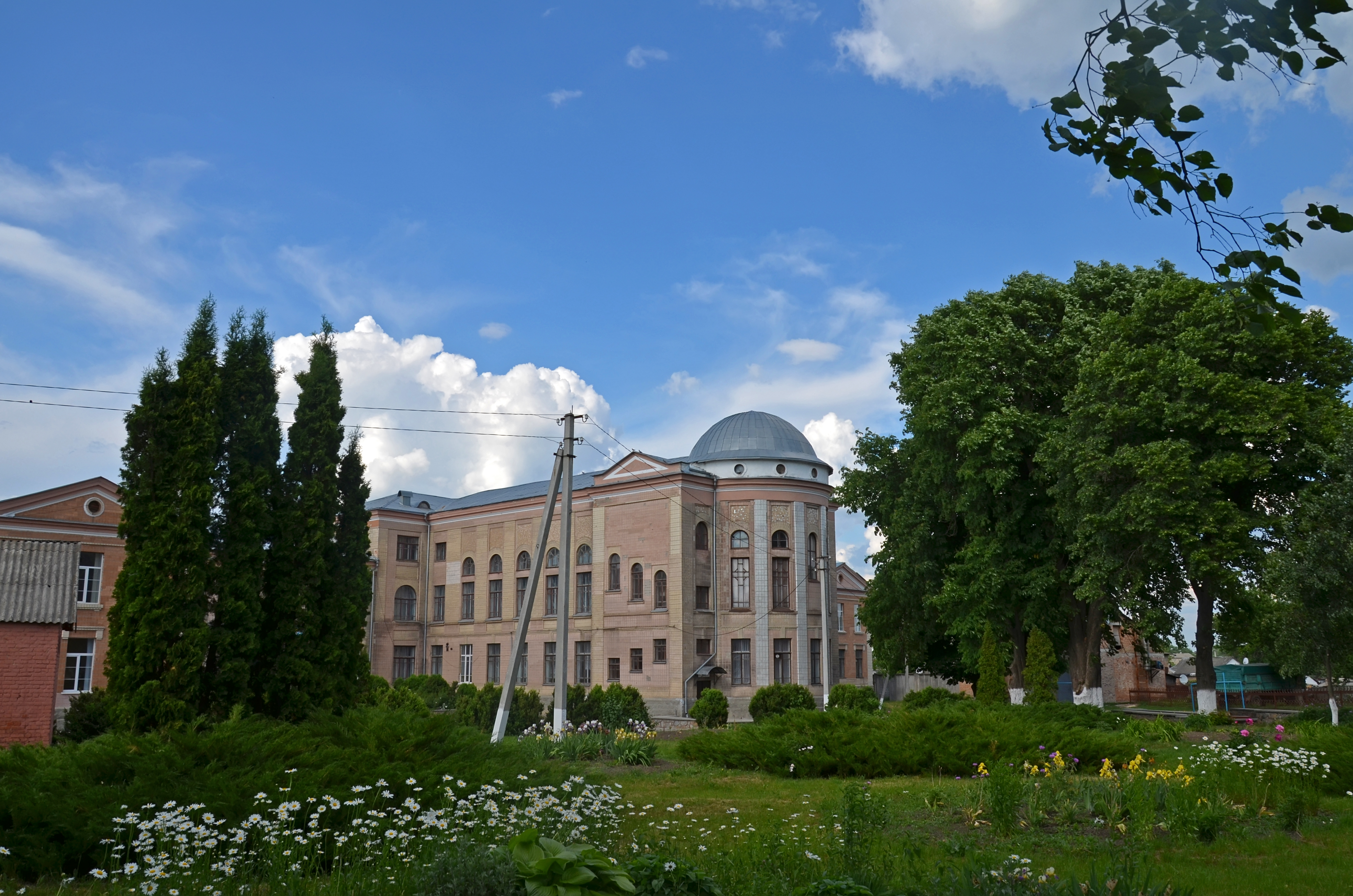 Будівля чоловічої гімназії (Сквирський ліцей), мур., Сквира, вул. Незалежності, 63